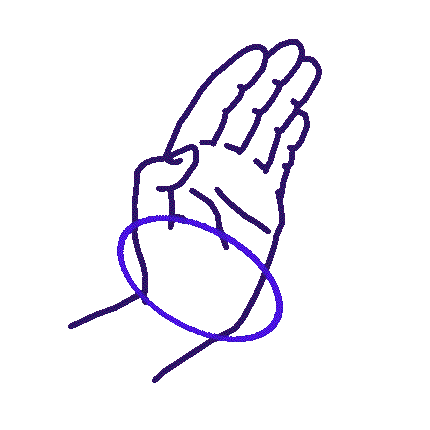 Forma de mão do Caratê em cuja se bate com a base do pulso